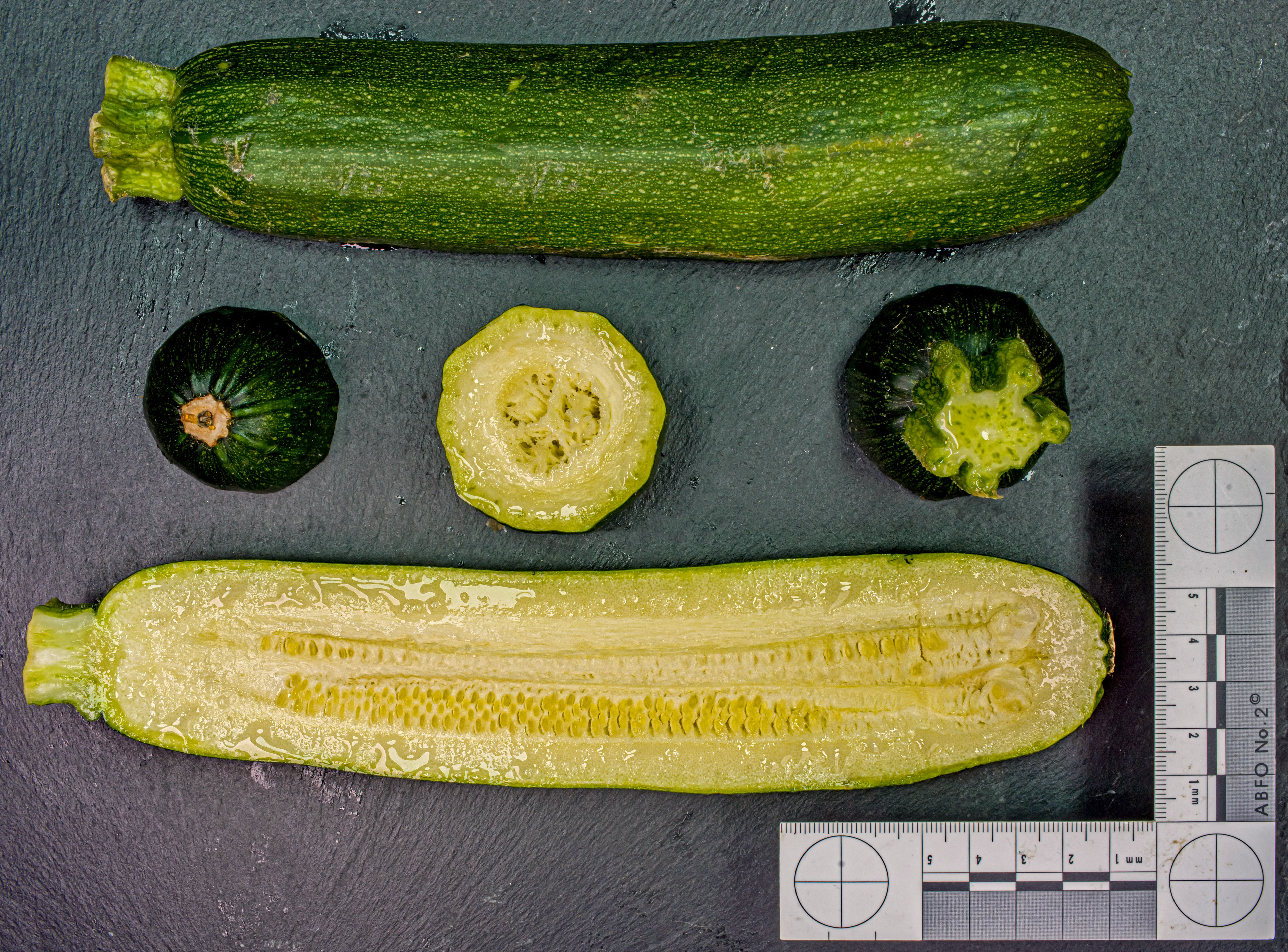 Querschnitte durch Gemüse. Zucchini